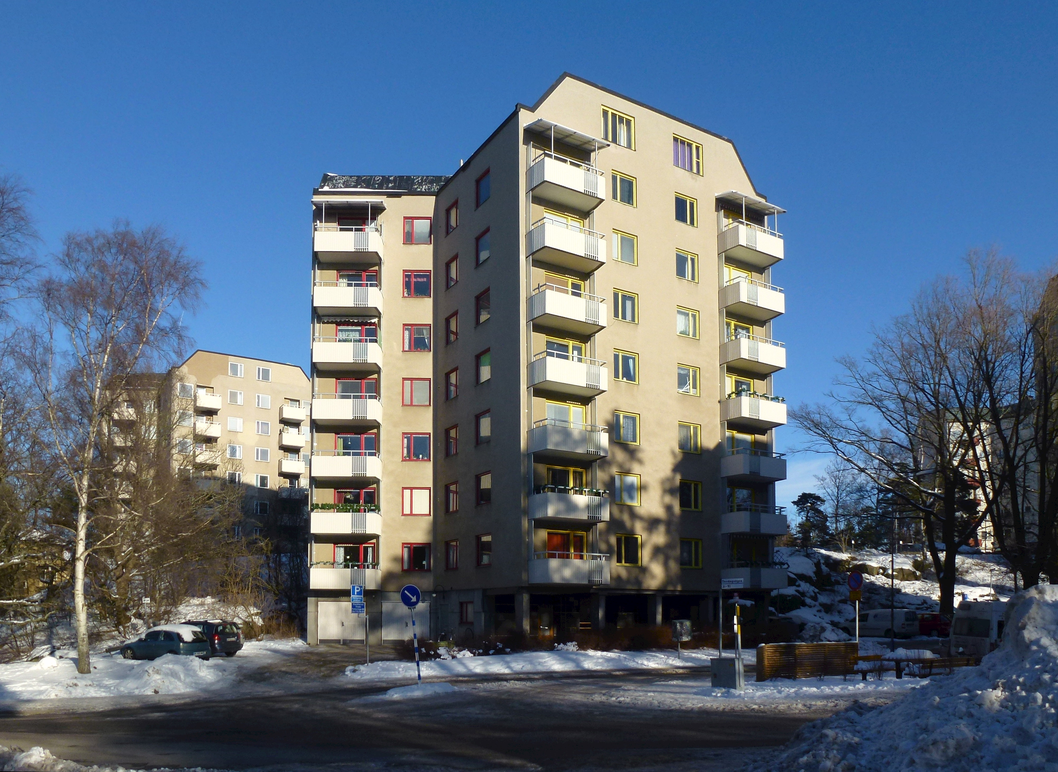 Västertorp, stjärnhus i Snöflingebacken ritade av Ancker-Gate-Lindegren